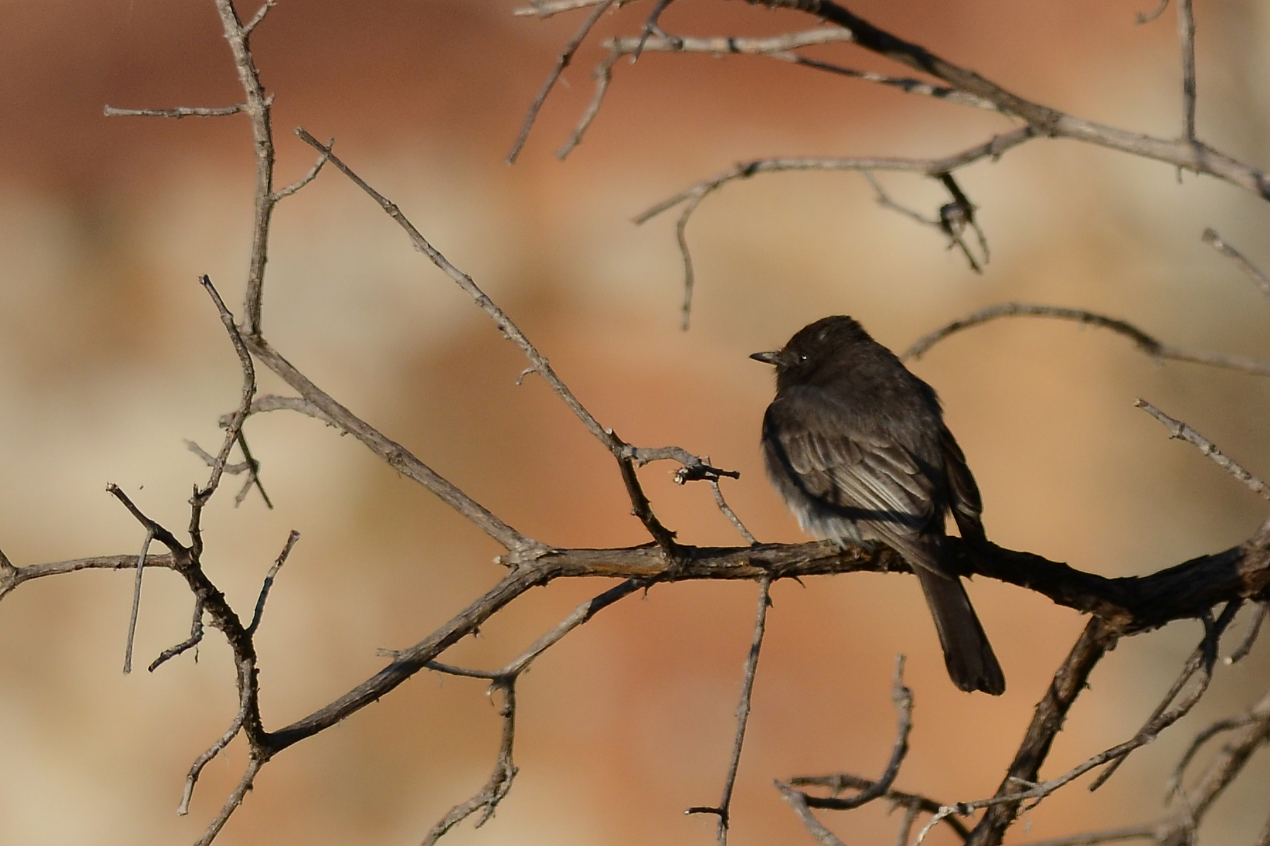 Aculco, Estado de México, México